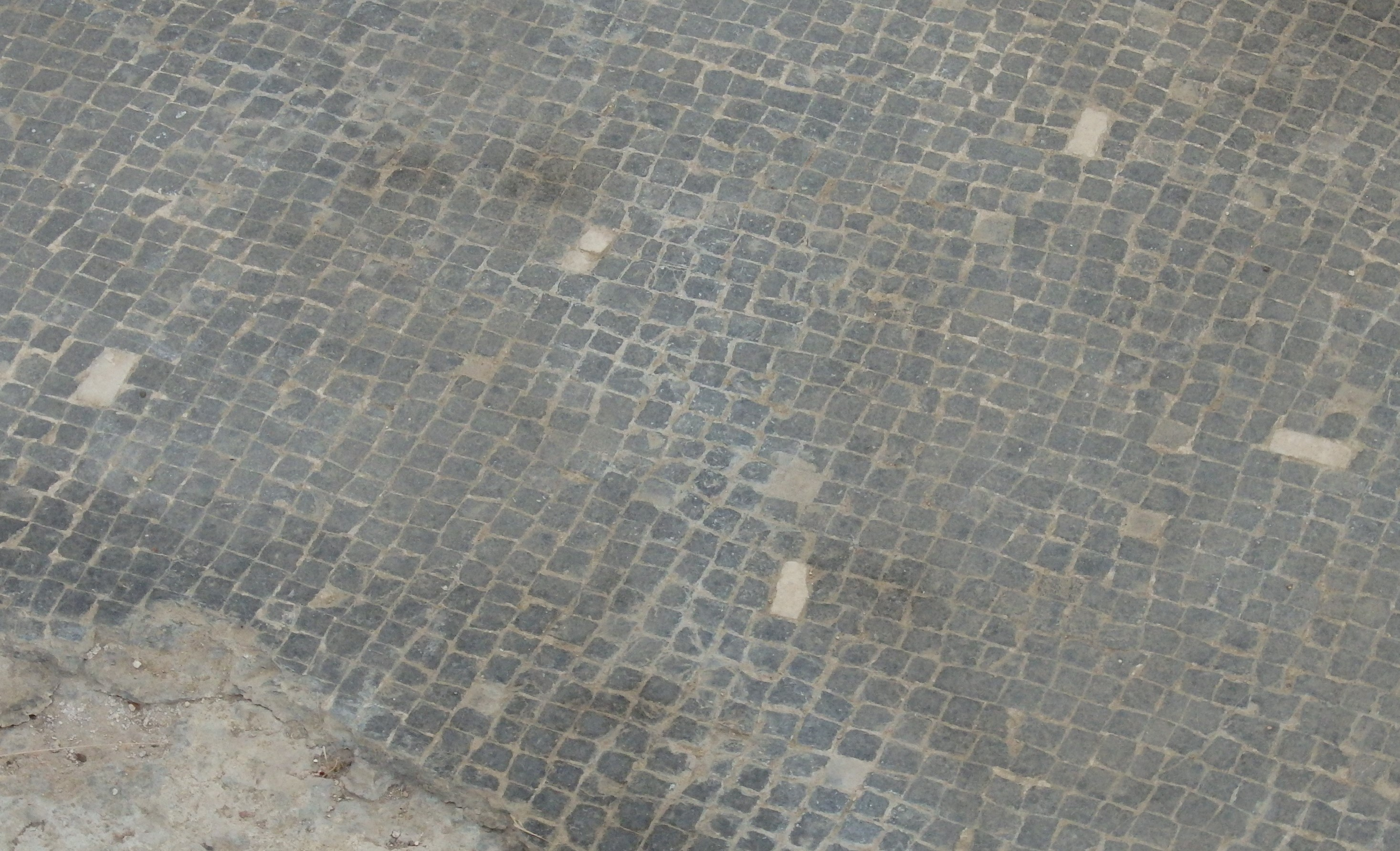 pavimentazione musiva della villa Neroniana